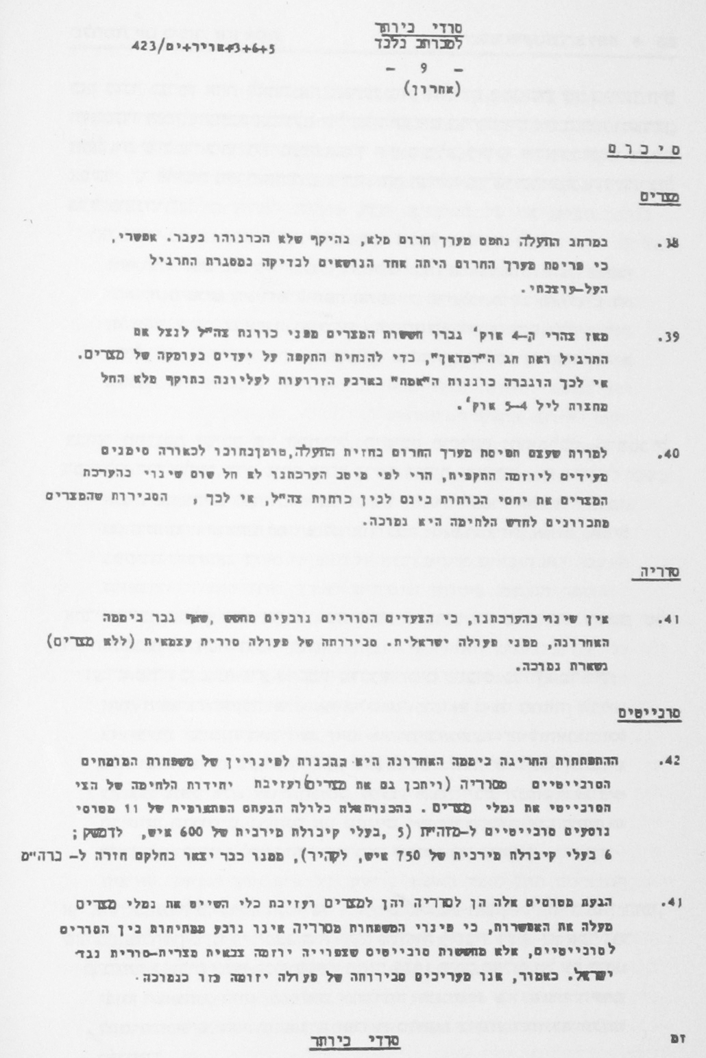 תיאור: סיכום מסמך ההערכה שהוציאה אמ"ן/מחקר ב-5 באוקטובר 1973, יום לפני פריצת מלחמת יום הכיפורים. אמ"ן/מחקר סיימה להכין את המסמך בשעה 11:00, והפיצה אותו לצרכנים בשעה 13:15. המסמך המלא, בסיווג :"סודי ביותר", היה בן תשעה עמודים וכלל 43 סעיפים, מתוכם 37 תיארו את מצב המוכנות הצבאית במצרים ובסוריה ואת פינוי הסובייטים משתי מדינות האלה. ששת הסעיפים הנותרים שהופיעו בסיכום המסמך העריכו את משמעות המידע ההתרעתי הזה. מקור: המסמך המופיע בתמונה הוכן על ידי אמ"ן/מחקר והוא צולם מהספר "מלחמת יום כיפור - זמן אמת" של רונן ברגמן וגיל מלצר, הוצאת משכל (עמוד 36). שימוש: בשל חשיבותו ההיסטורית הרבה נעשה שימוש בתמונה בערך מלחמת יום הכיפורים וכן בפסקאות העוסקות במלחמה בערכים אגף המודיעין וחטיבת המחקר.